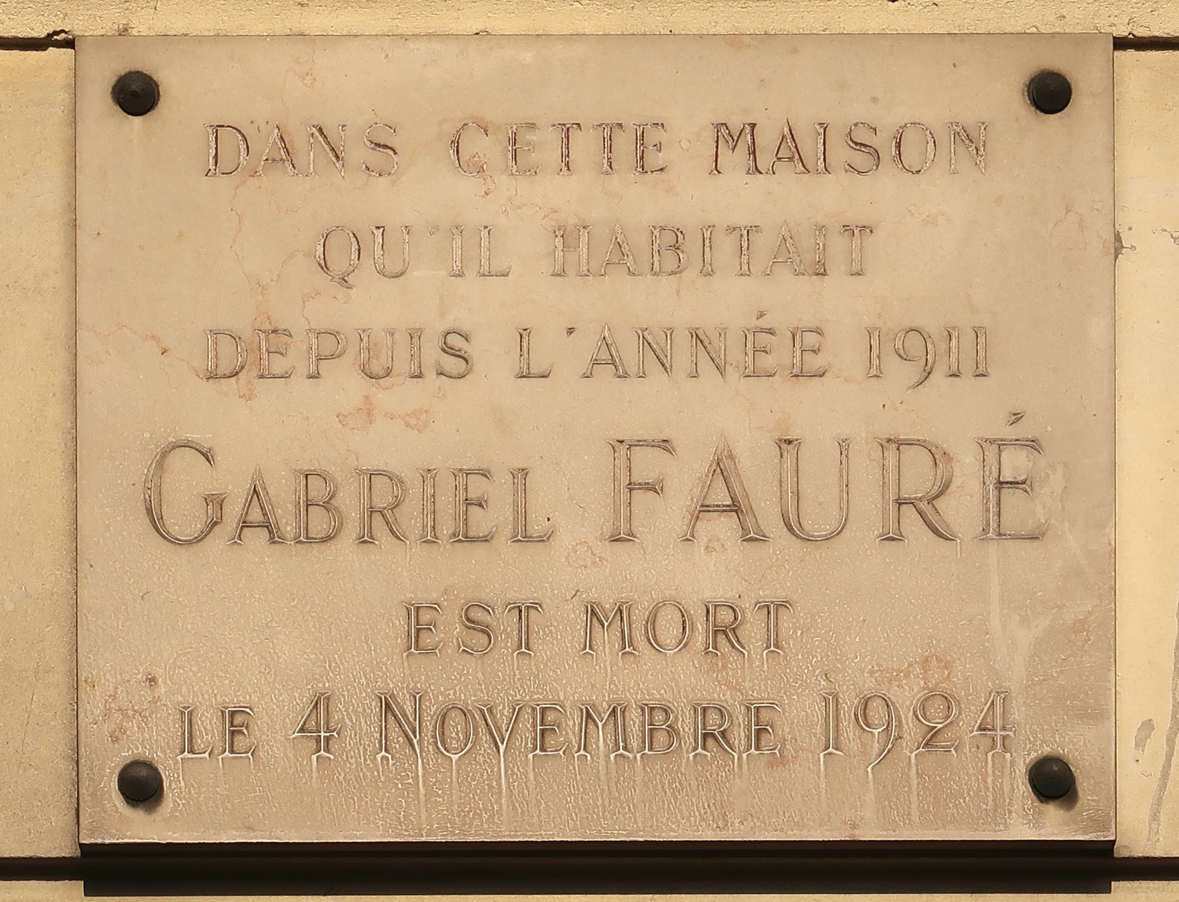 Plaque en hommage au compositeur Gabriel Fauré, 32 rue des Vignes (Paris 16e).